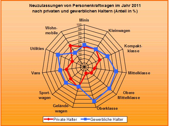 Neuzulassungen von Personenkraftwagen in Deutschland im Jahr 2011 nach privaten und gewerblichen Haltern (Anteil in Prozent), aufgesplittet nach Segmenten